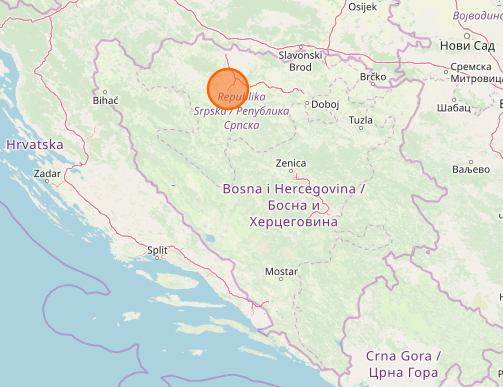 Señalización de Zalužani en Bosnia y Herzegovina, con OpenStreetMap.